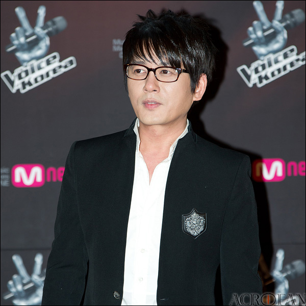 신승훈. '보이스코리아' 제작발표 및 하이라이트 시사회에서